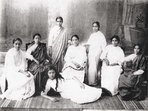 Hebrew class at the Huzurpaga High School for Indian Girls, future educator and Bene Israel's community leader Rebecca Reuben is seated in the middle (circa 1913).